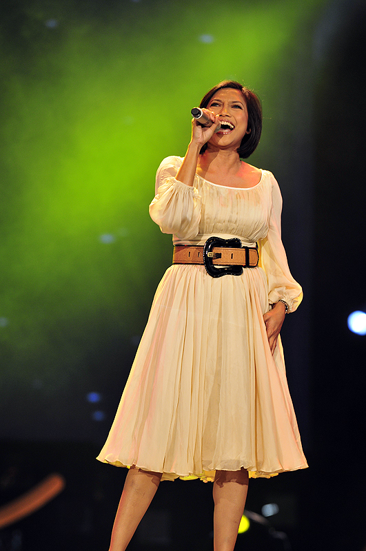 Anugerah Juara Lagu 23 Rehearsal